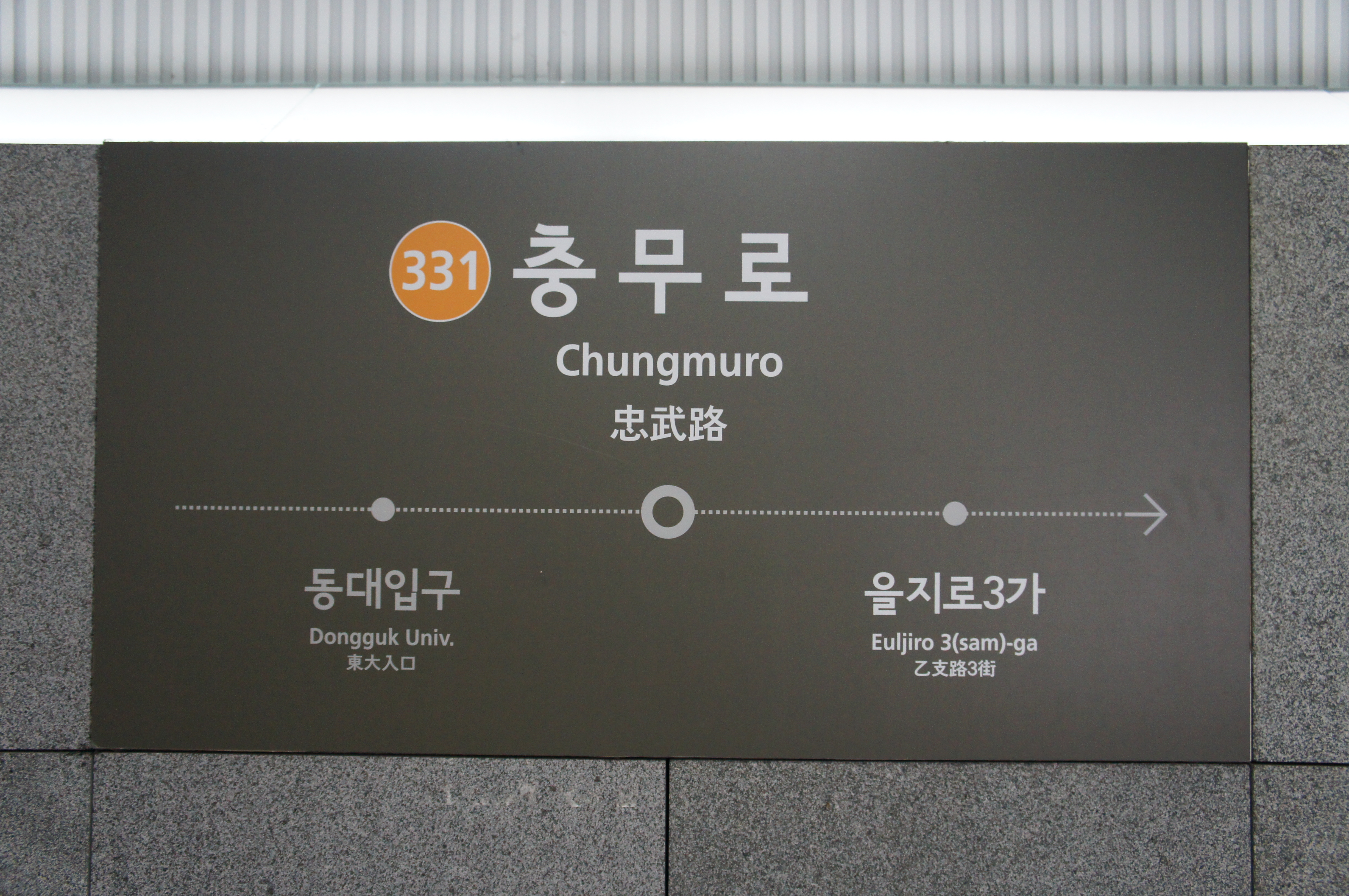 충무로역 3호선 역명판